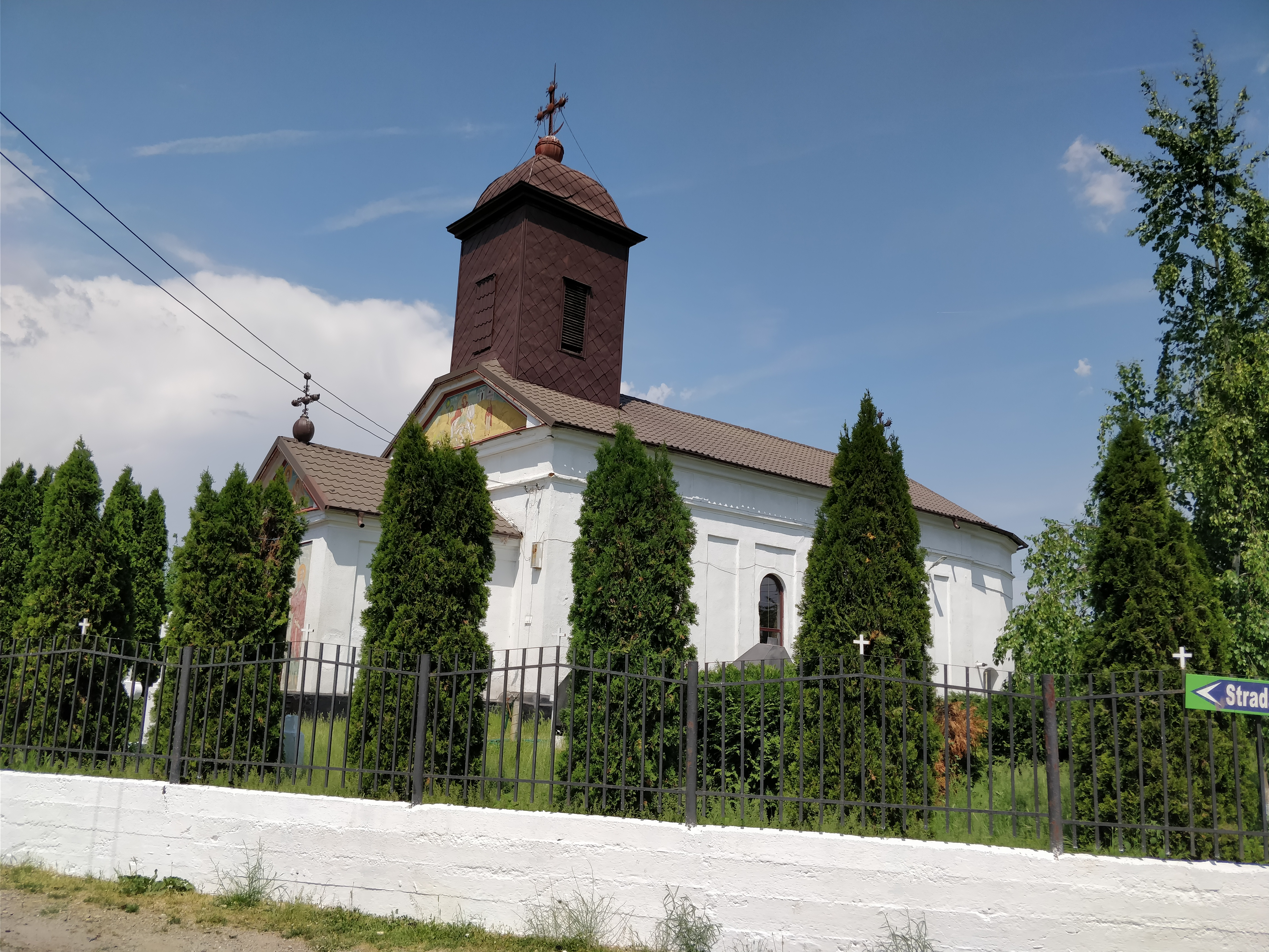 Biserica „Sf. Gheorghe”